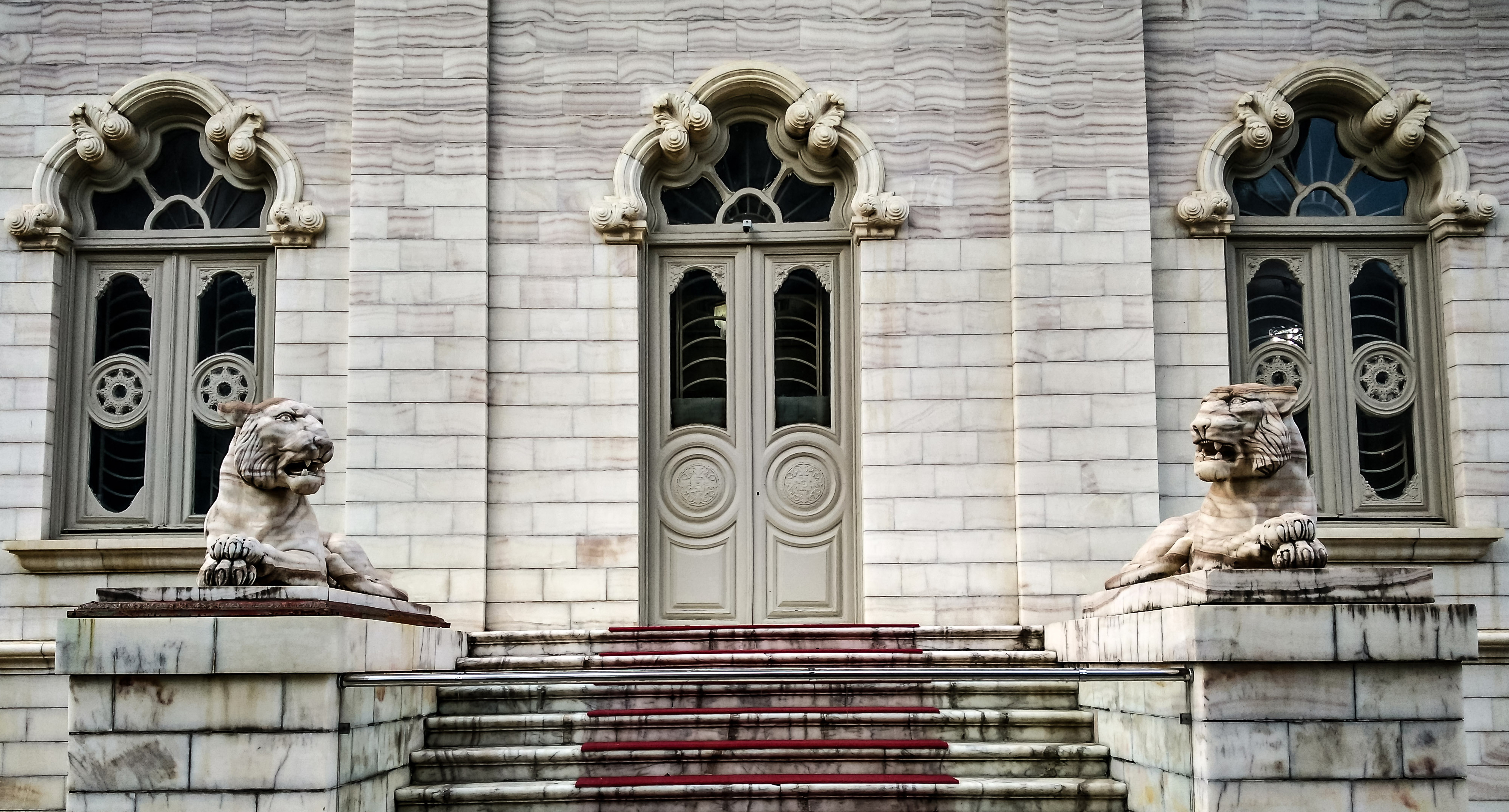 رگه های سنگ های این کاخ همه در یک راستا قرار دارند، به همراه مجسمه ببر های مرمرین-نمای پشت کاخ